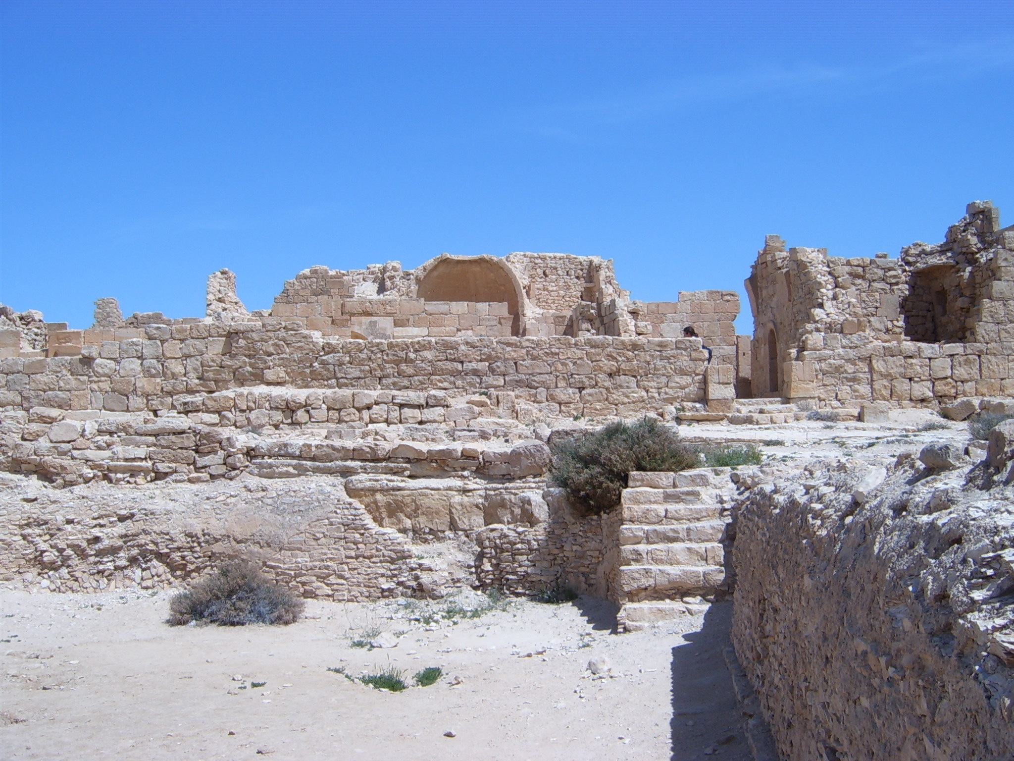 shivta - 032.jpg